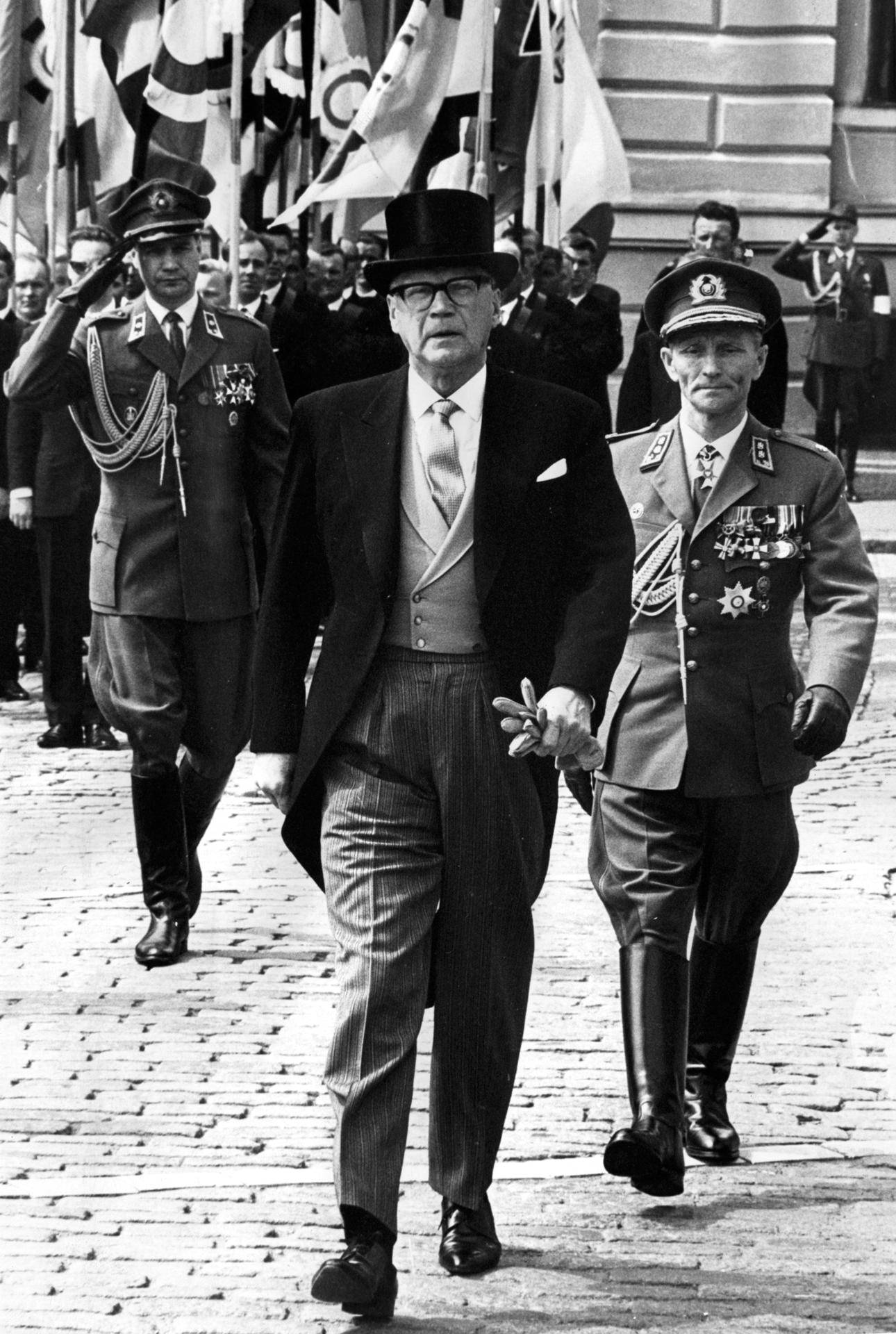 Puolustusvoimain ylipäällikkö ja puolustusvoimain komentaja paraatikatselmuksessa: presidentti Kekkonen seurassaan kenraaliluutnantti Yrjö Keinonen sekä adjutantti, majuri Keijo Tuominen.